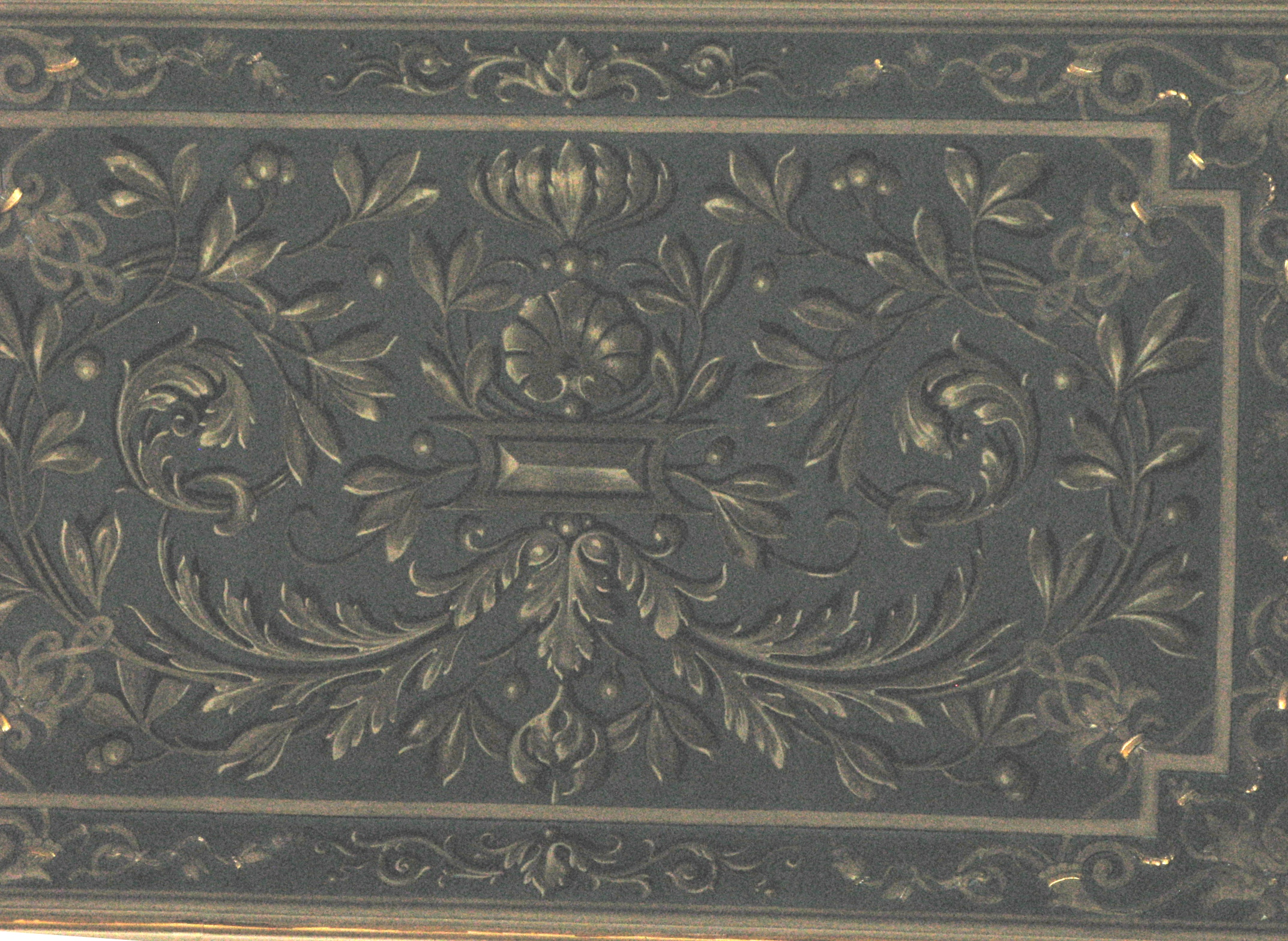 Detajl poslikave svečane dvorane na Univeri v Ljubljani